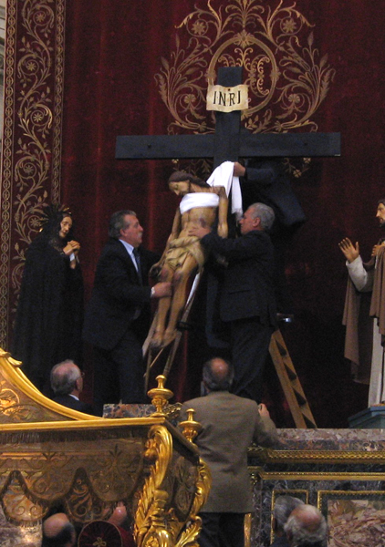 Venerdì Santo: 'A scisa 'a Cruci - Zafferana Etnea (CT) - Foto D. Pennisi